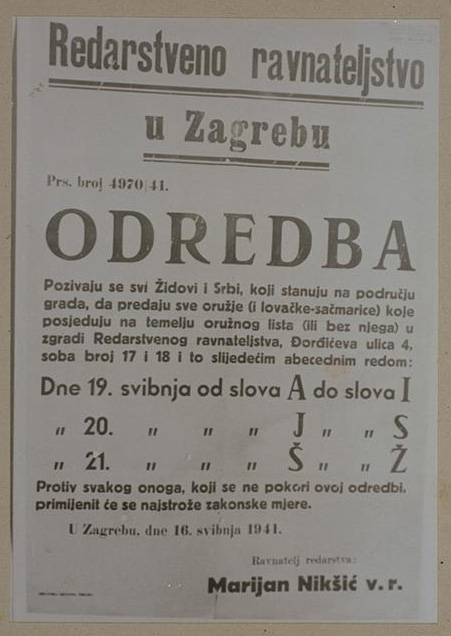 Јавно власништво, као проглас државног органа (НДХ), те тако не подлеже заштити ауторског права.